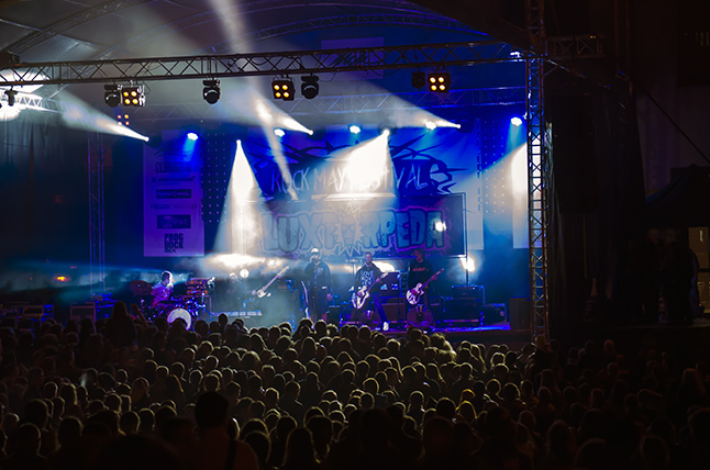 Luxtorpeda Rock May Festival 2013